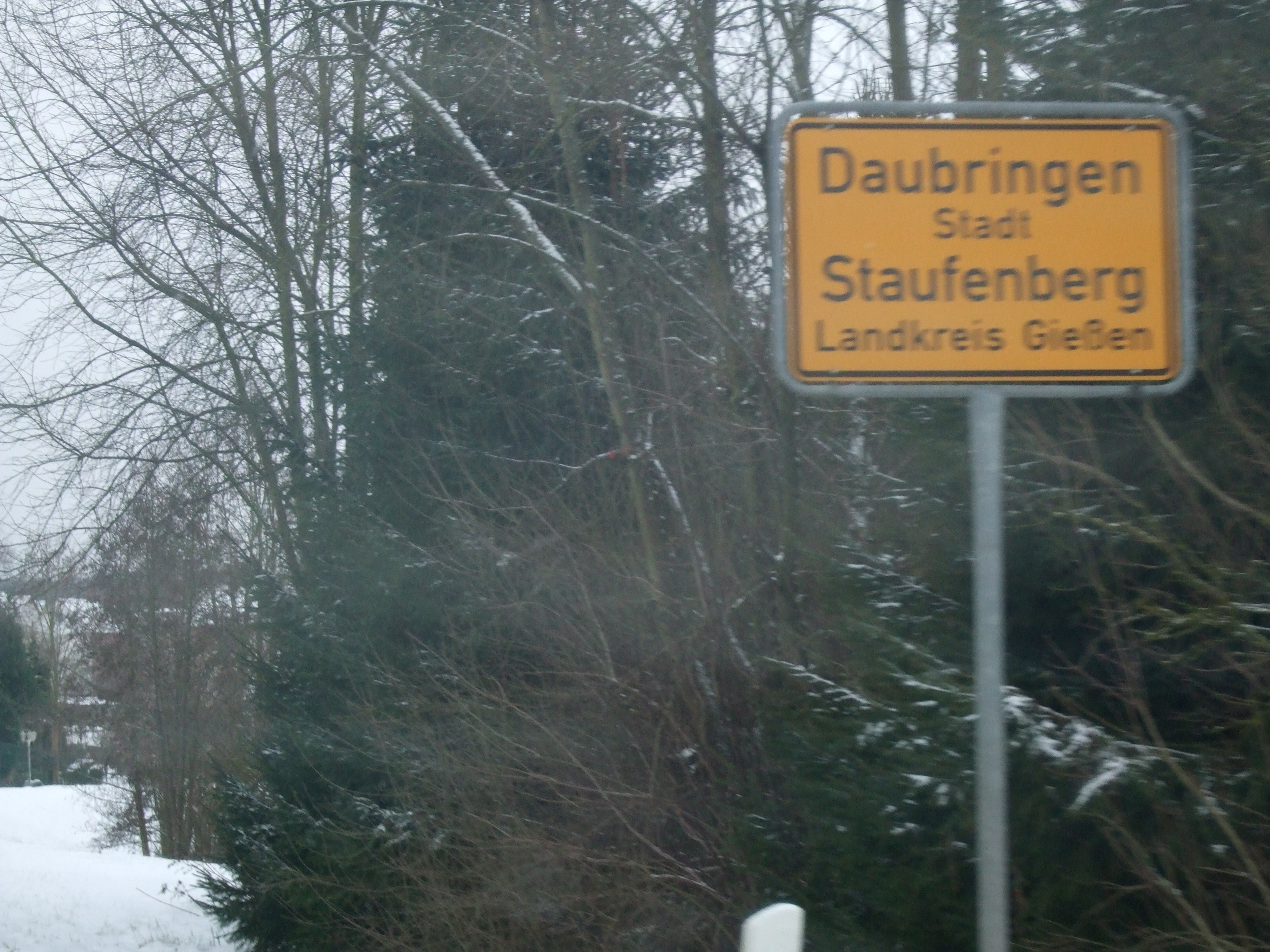 Ortsschild von Daubringen in Landkreis Gießen, Hessen